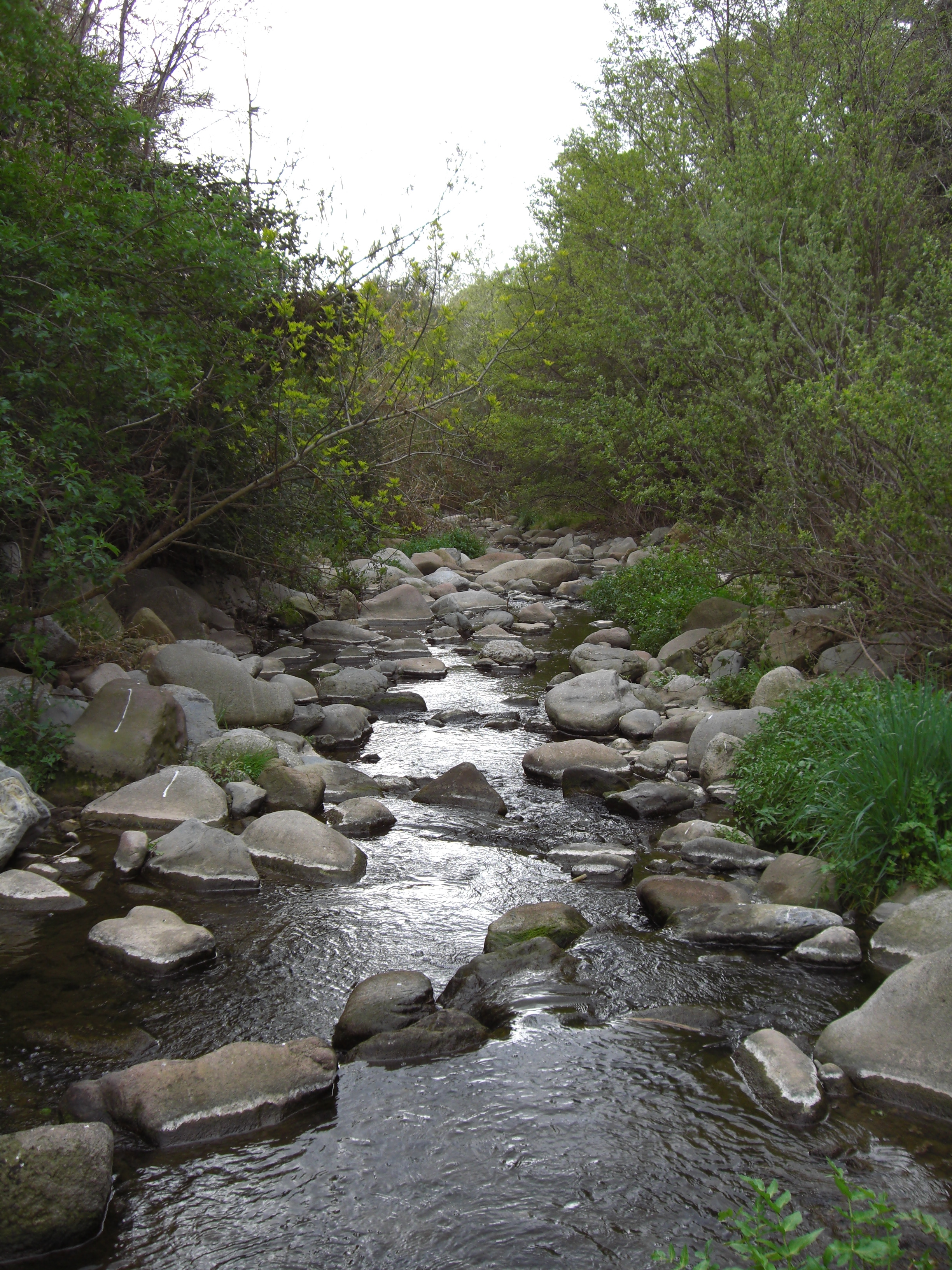 Riu Congost